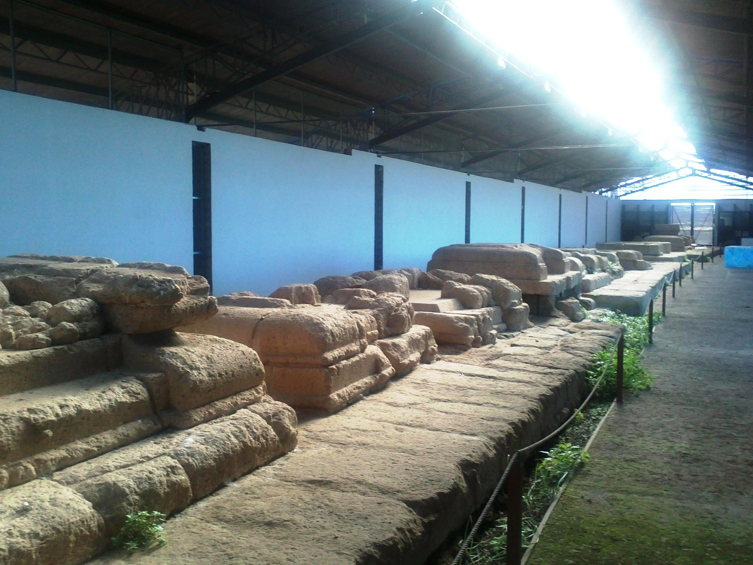 Lavinium - Santuario delle XIII are